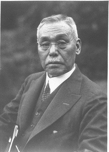 鎌田栄吉（安政4年(1857)1月21日生、昭和9年(1934)2月5日没。）明治7年(1874)4月27日慶應義塾入塾、明治8年(1875)4月卒業、義塾教員。明治31年(1898)4月-大正11年(1922)3月塾長。文部大臣、交詢社理事長、日本教育会会長、枢密顧問官、貴族院議員。